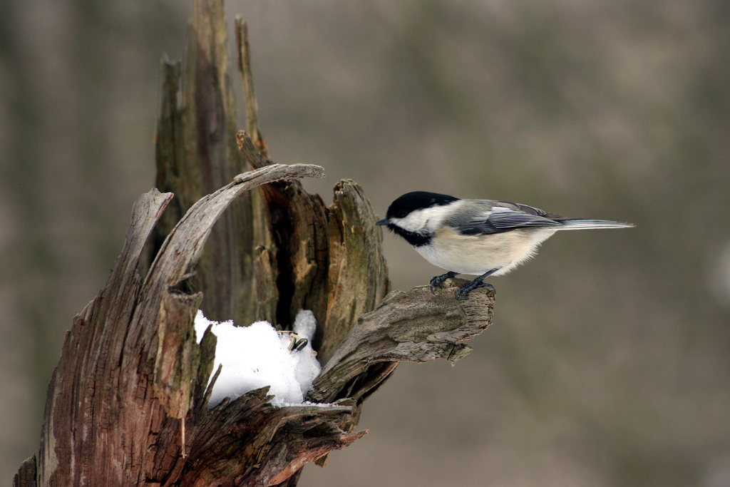 Poecile atricapillus (Mésange à tête noire)